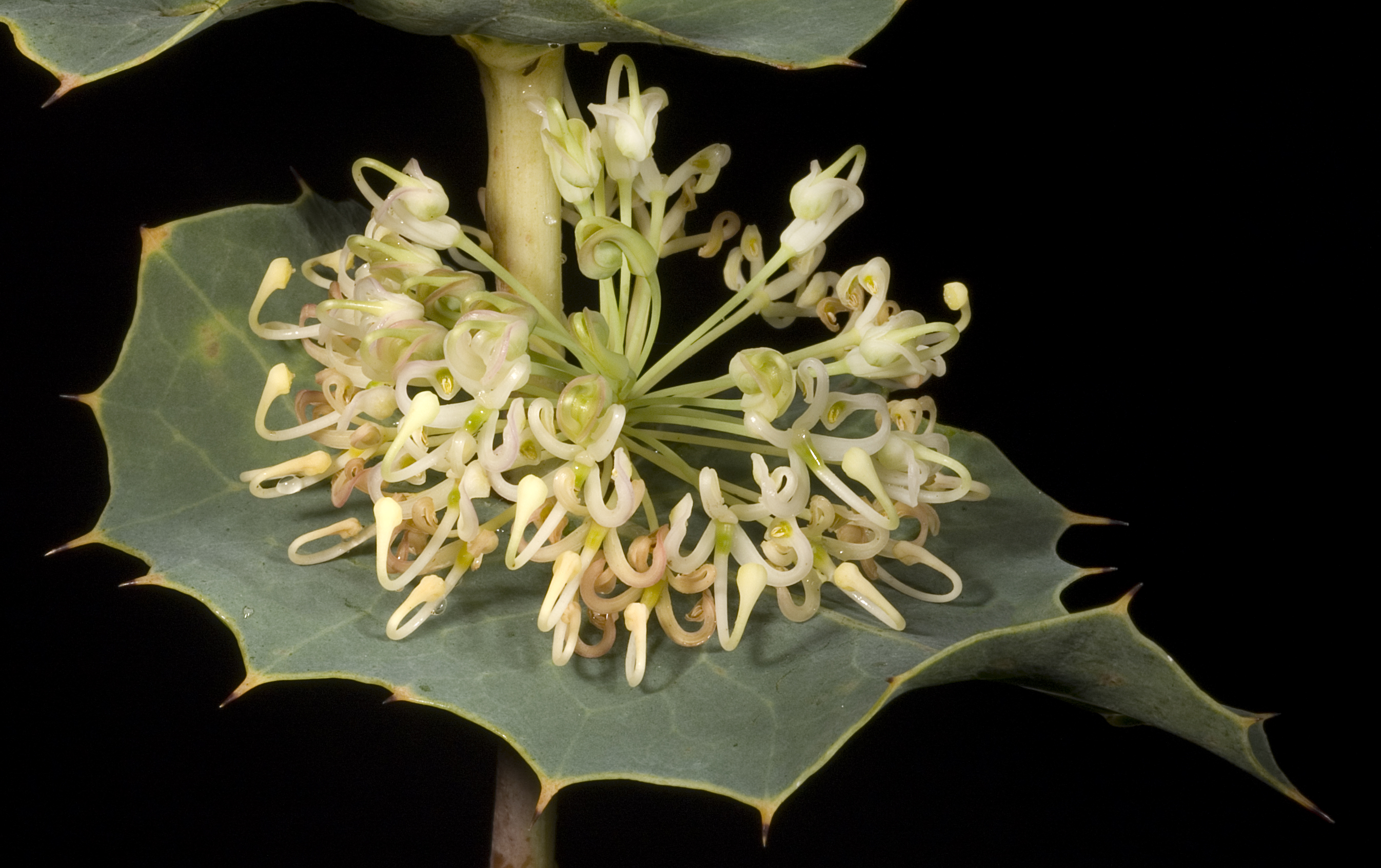 KRT3338